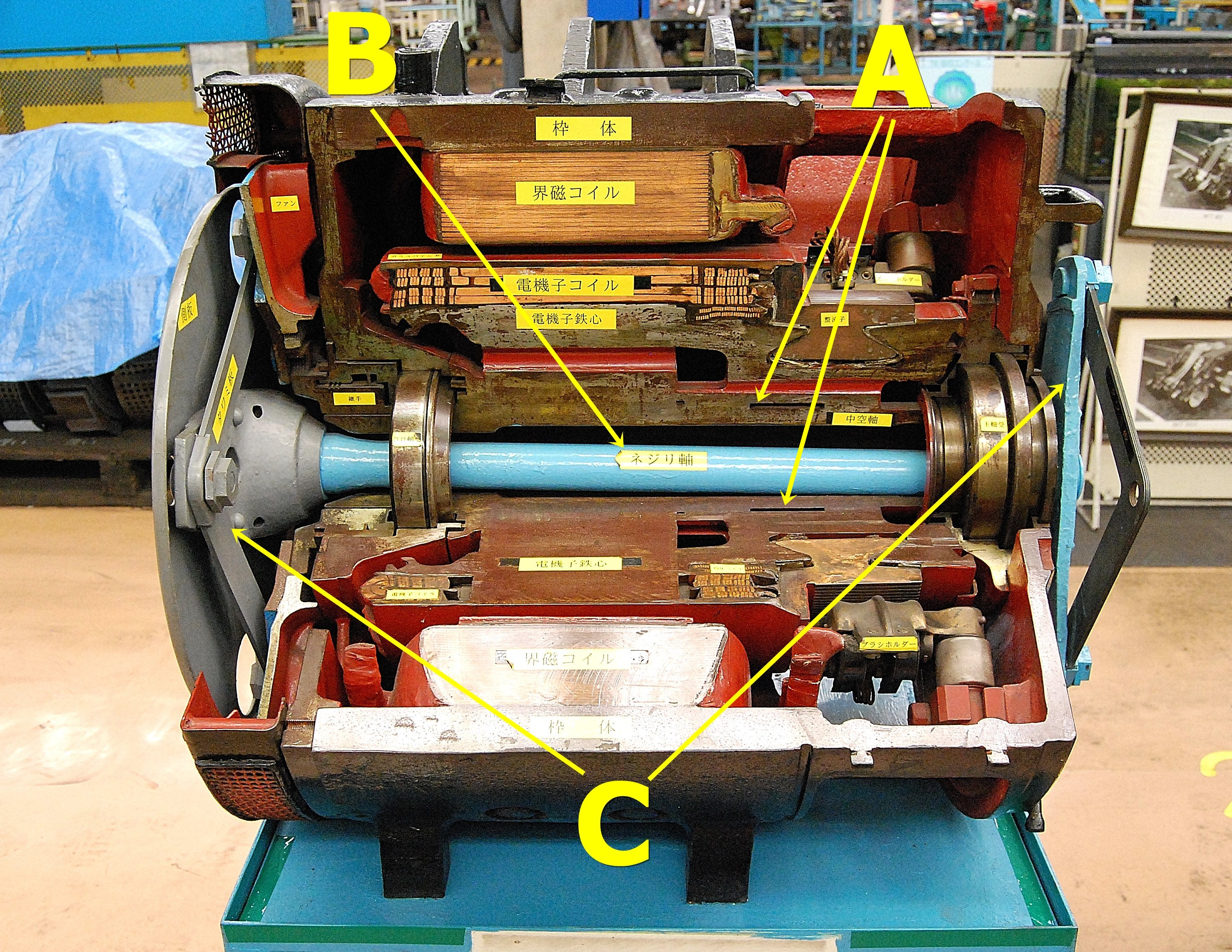 中空軸並行カルダン駆動方式を採用したMT55直流電動機。A中空軸･Bねじり軸（駆動軸）･Cたわみ板継ぎ手（夏休みフェアイベントでのJR東京総合車両センター公開時に撮影）